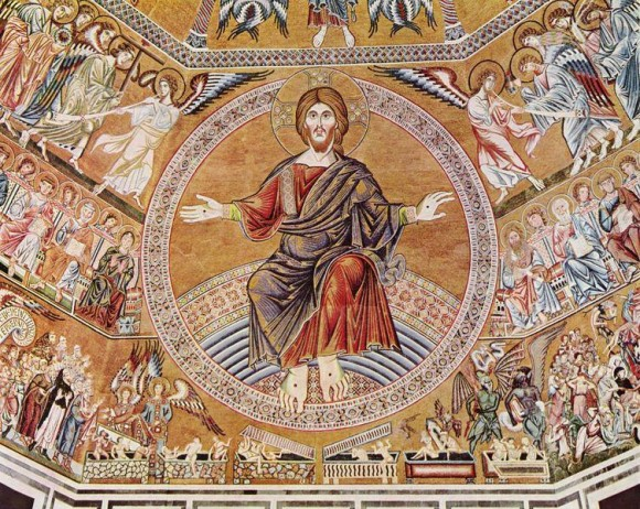 Христос Пантократор и Страшный суд. Италия, 1300 г. Мозаика в Баптистерии Сан Джованни во Флоренции